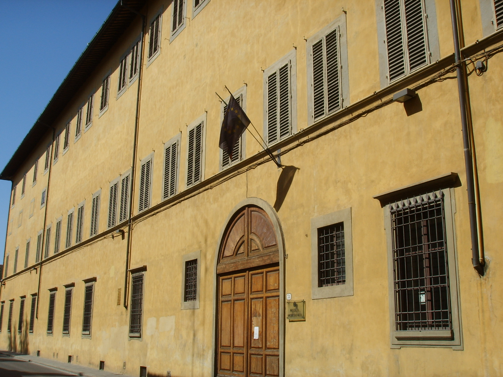 Il Palazzo della Crocetta, in piazza Santissima Annunziata 1, risale al 1620, e fu costruito da Giulio Parigi come residenza della principessa Maria Maddalena de' Medici. Oggi ospita il Museo archeologico nazionale di Firenze.